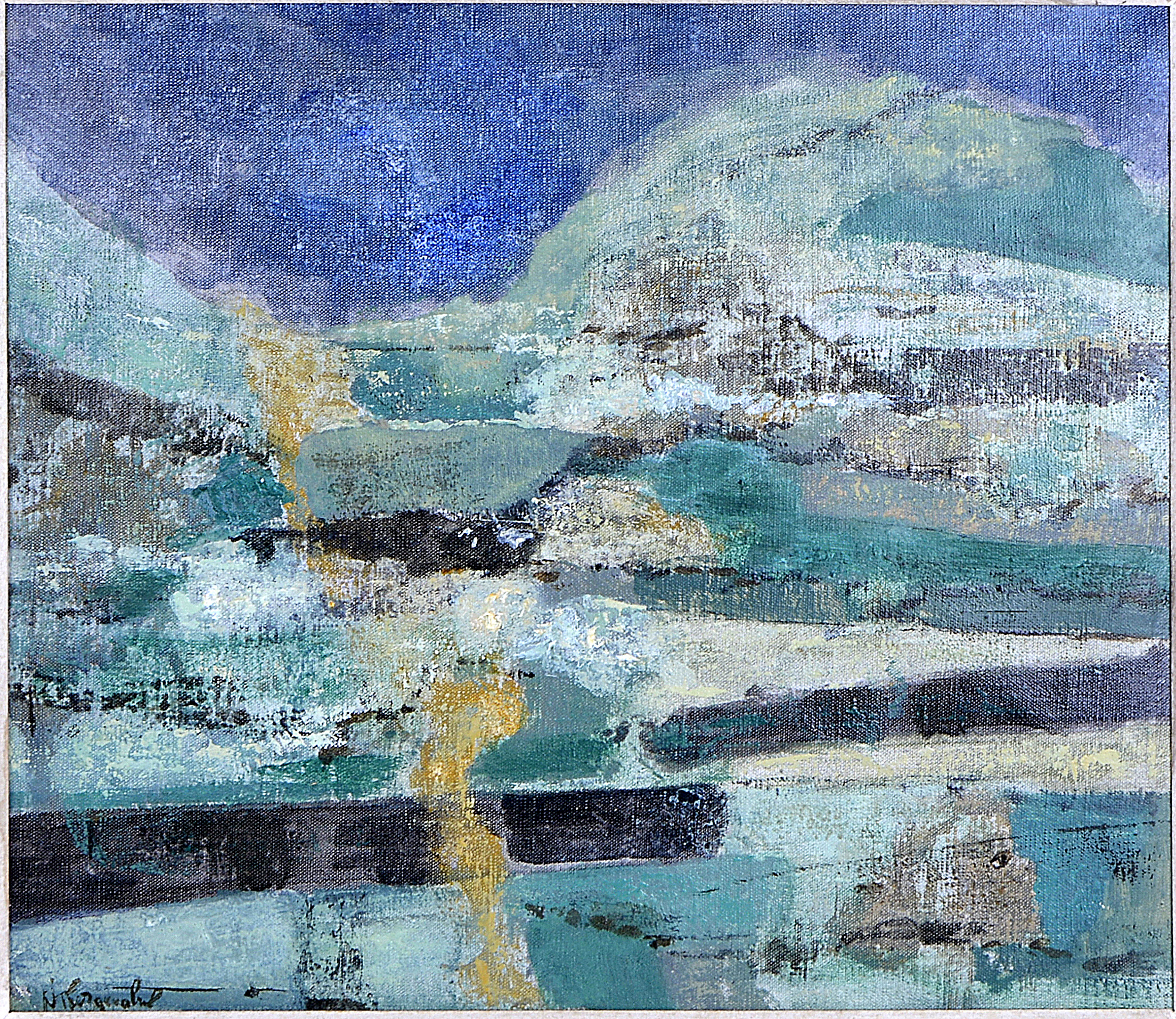 Srpski (latinica): Delo Mali predeo autora Nedeljka Gvozdenovića. Godina nastajanja: 1963. Tehnika: ulje na platnu. Deo je zbirke Istorije umetnosti Narodnog muzeja u Leskovcu.